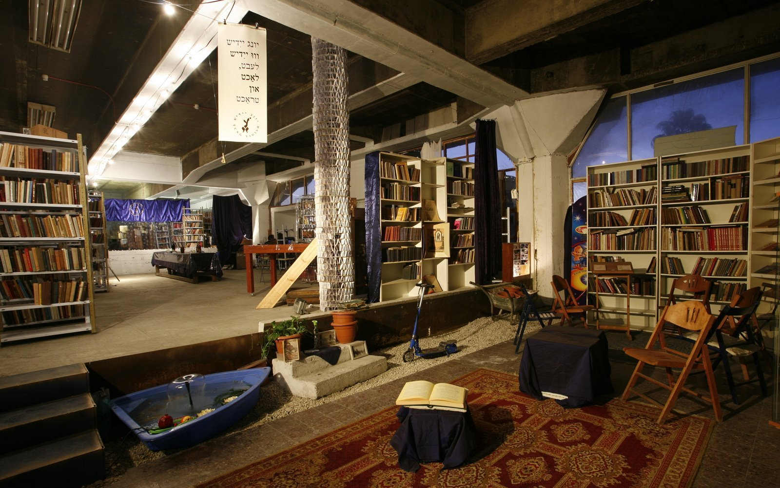 Yung YiDiSH Tel Aviv Photo: Eyal Landsman